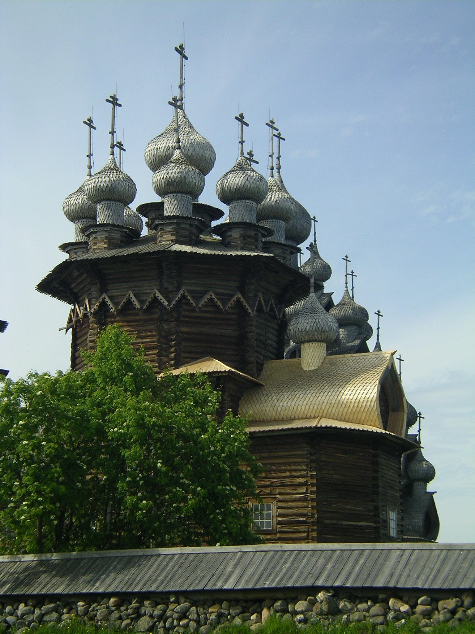 Karelien church in Khizi